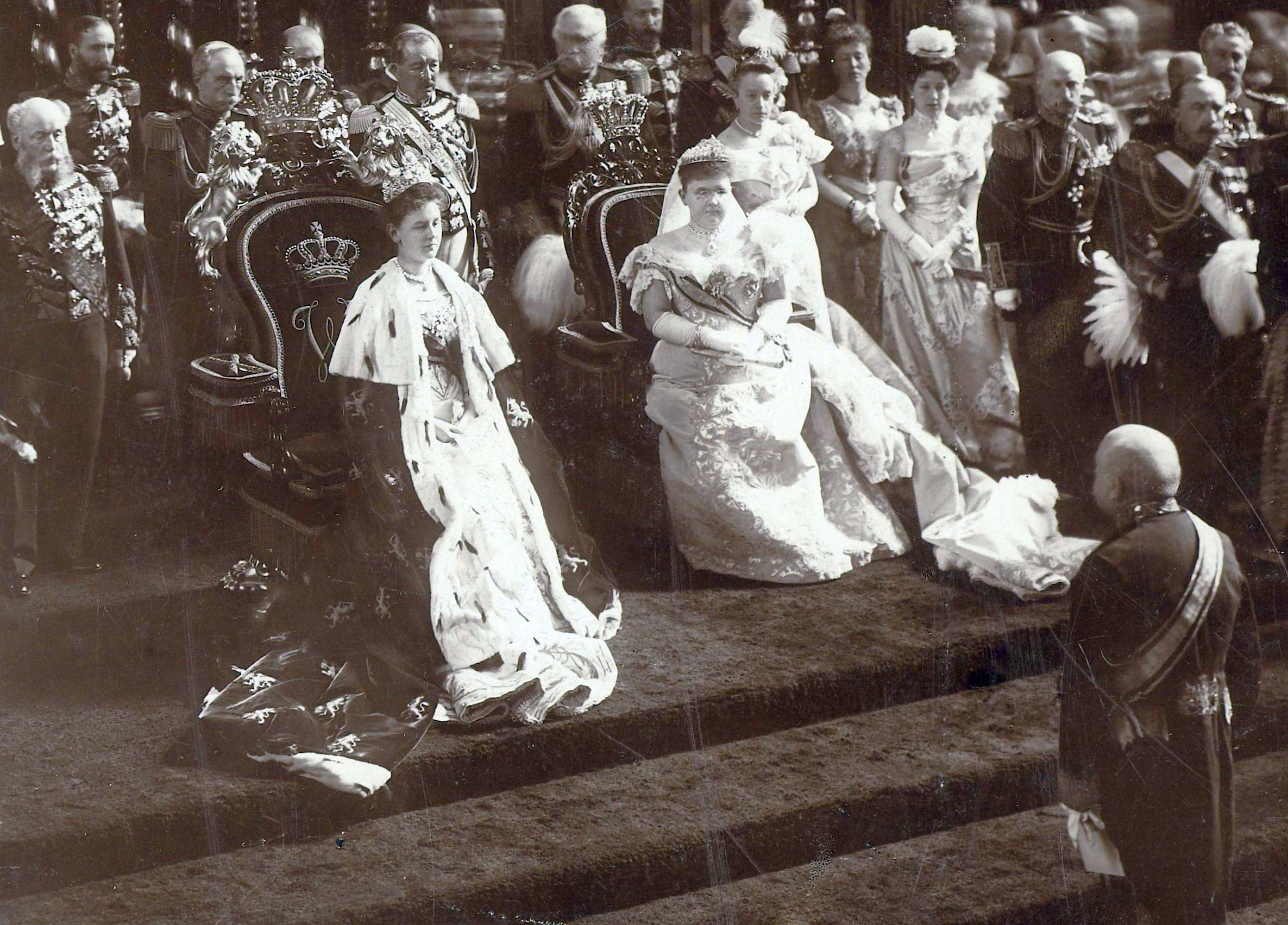 IdentificatieTitel(s): De inhuldiging van koningin Wilhelmina in de Nieuwe Kerk in AmsterdamObjecttype: foto Objectnummer: RP-F-00-5452Opschriften / Merken: naam, rechtsonder, gedrukt: ‘H. Deutman Art. Photographe 's-Gravenhage Zeestraat 55’Omschrijving: Koningin Wilhelmina op een troon met naast zich haar moeder, regentes Emma, achter een groep hooggeplaatste mannen in uniform.VervaardigingVervaardiger: fotograaf: H.F.J.M. Deutmann (vermeld op object)Plaats vervaardiging: Den HaagDatering: 1898Fysieke kenmerken: daglichtcollodiumzilverdrukMateriaal: papier Techniek: daglichtcollodiumzilverdrukAfmetingen: foto: h 224 mm × b 215 mmblad: h 324 mm × b 360 mmVerwerving en rechtenVerwerving: overdracht van beheer 1994Copyright: Publiek domein